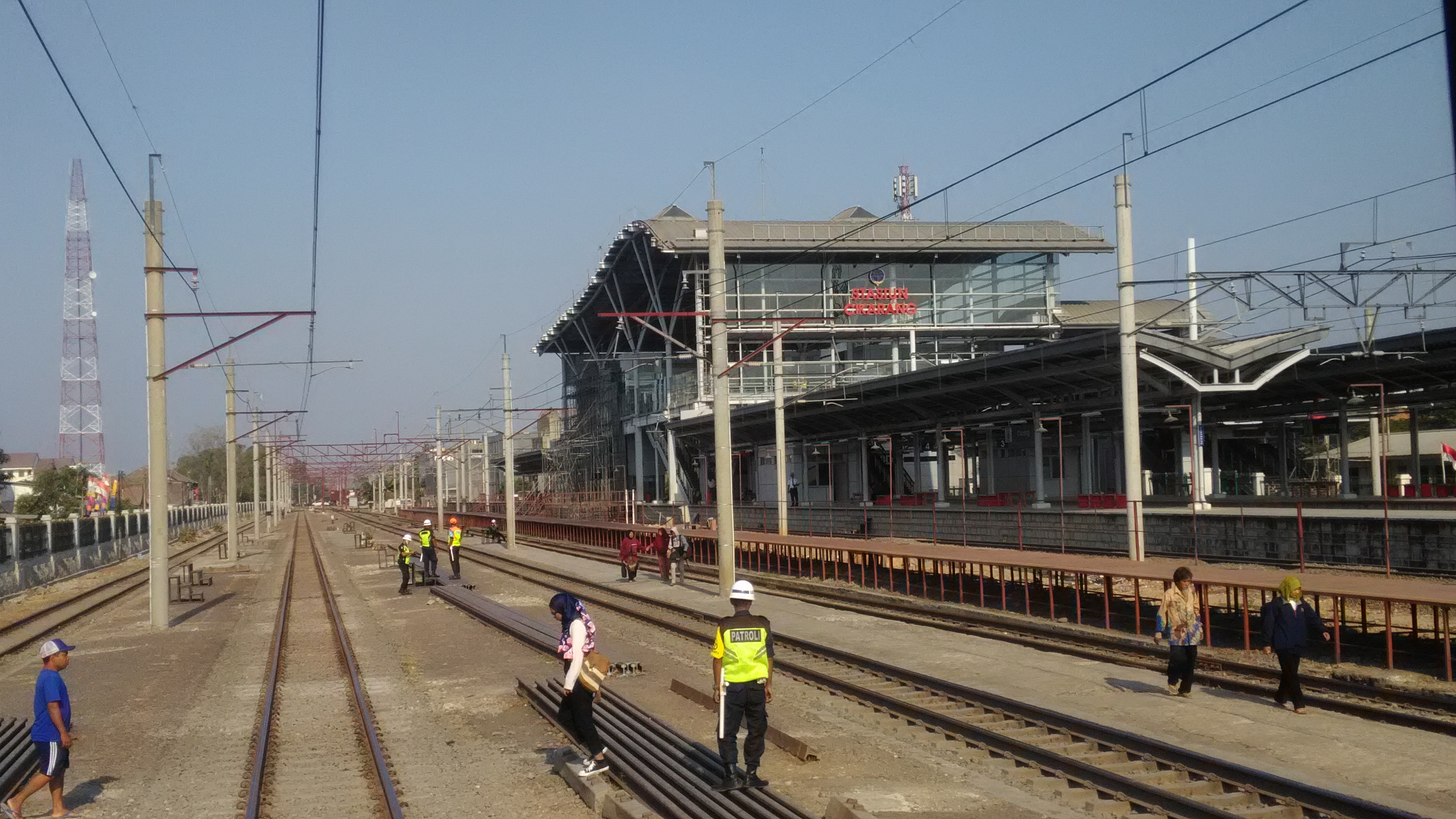 Stasiun Cikarang, 2019 Basa Sunda: Stasion Cikarang, 2019